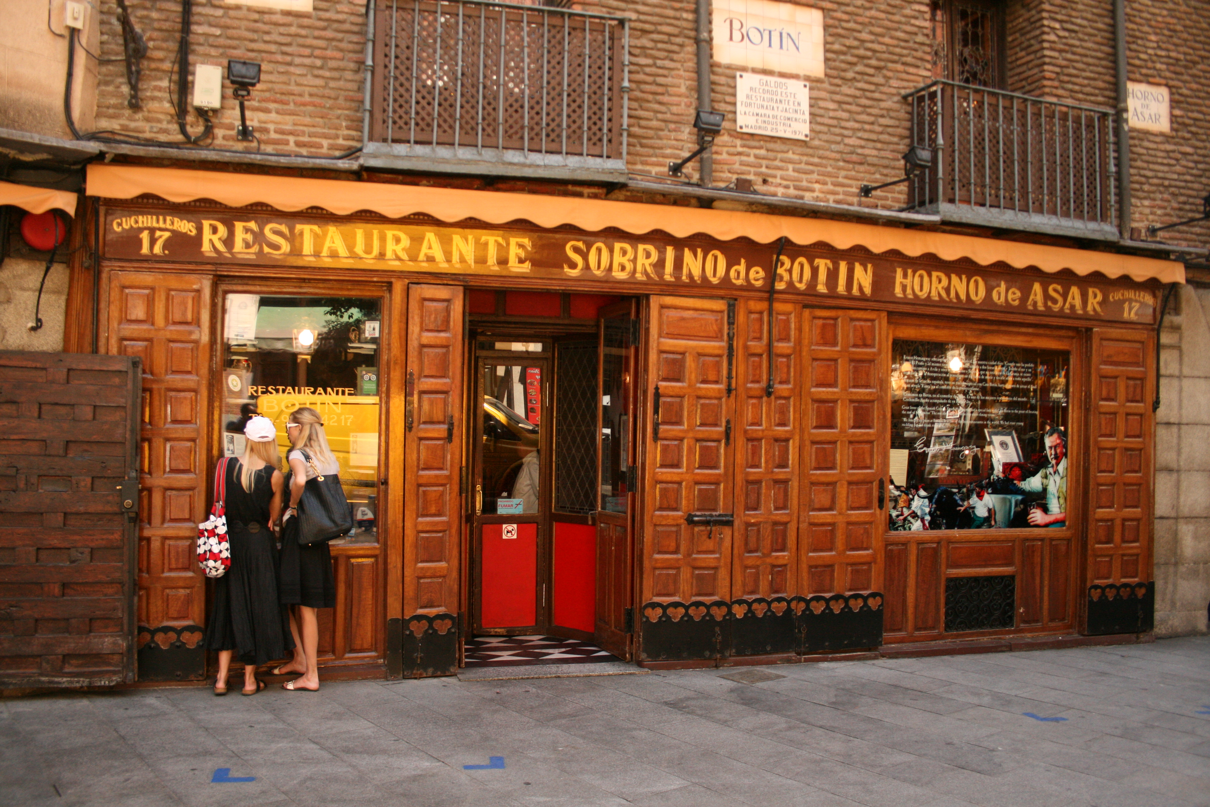 Restaurante Casa Botín